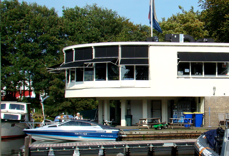 terraszijde